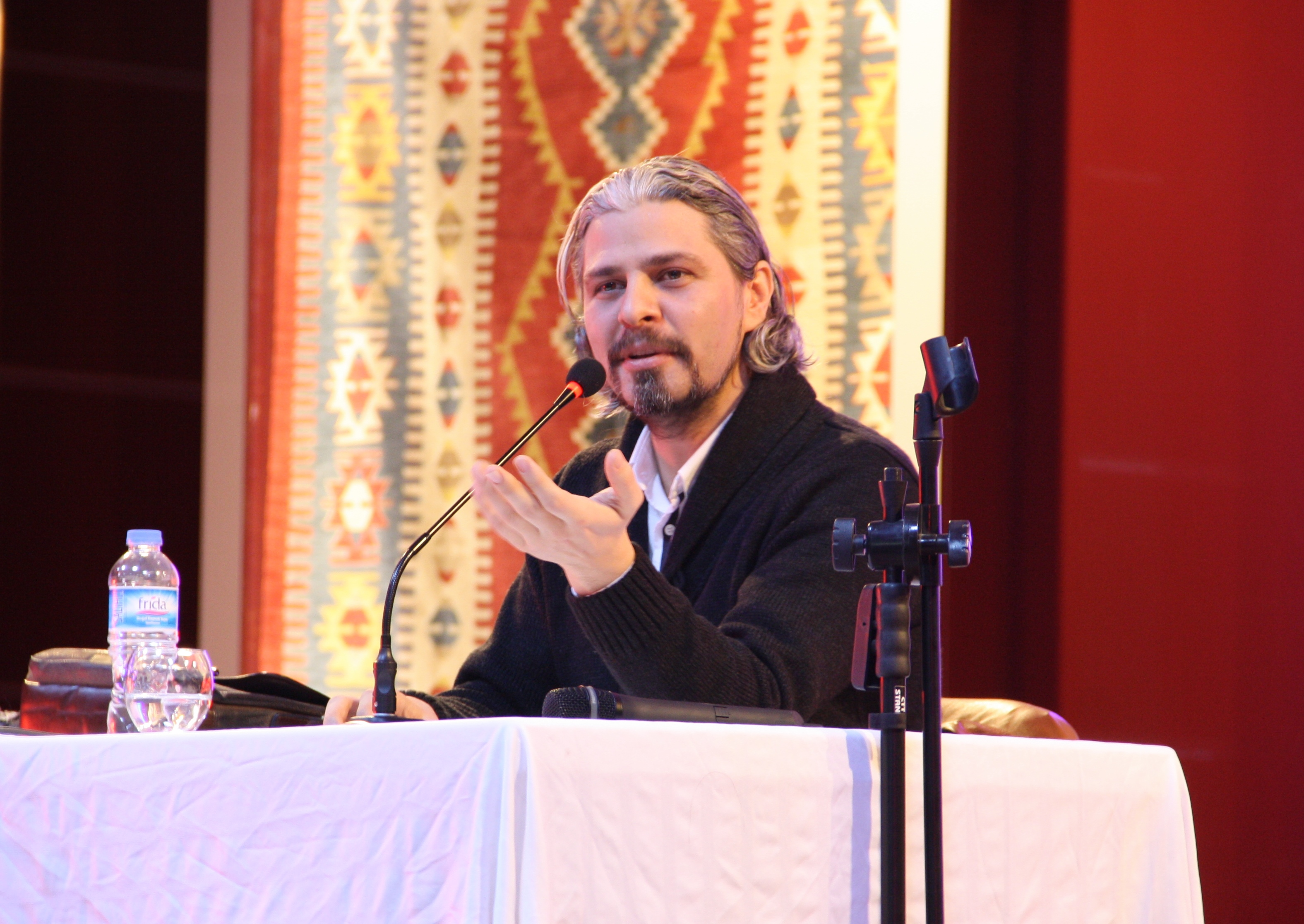 Cenk Enes Özer-2013 UŞAK ÜFTADE KOLEJİ (1)